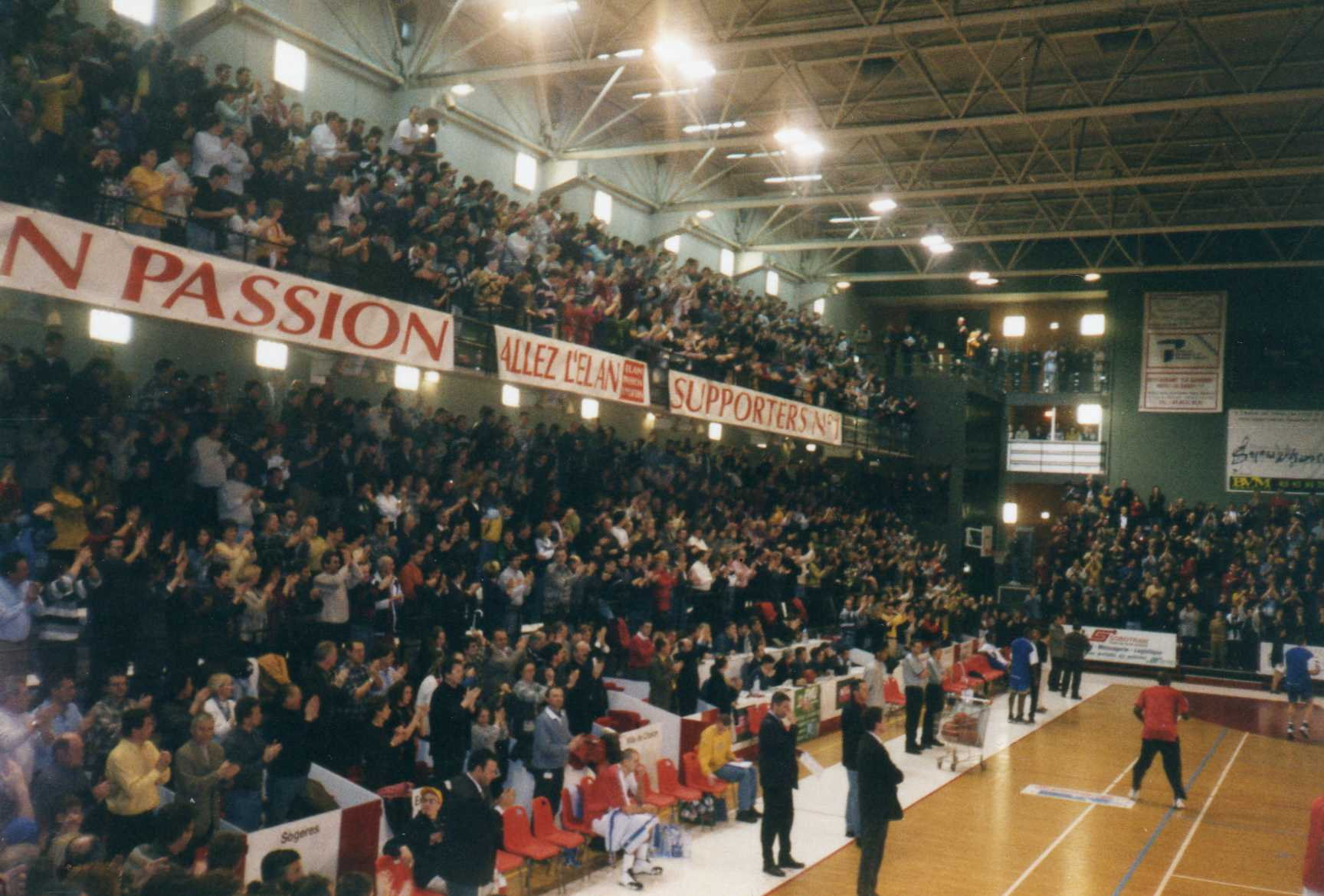 Maison des Sports (Match Pro A : Saison 1998 - 1999), Elan Chalon contre Montpellier Paillade Basket